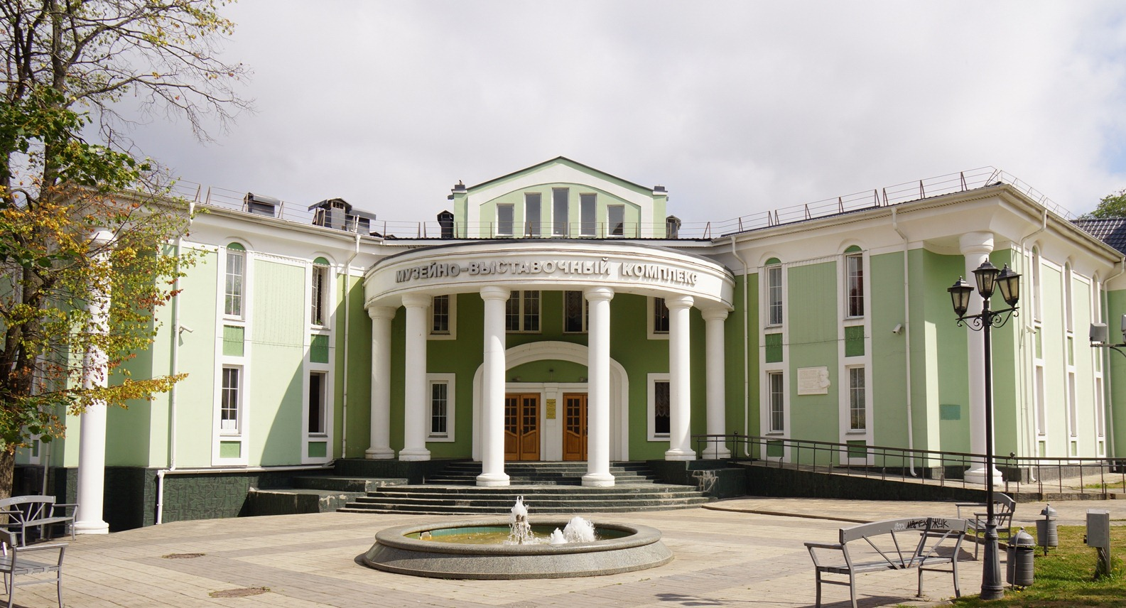 Музейно-выставочный комплекс музея-заповедника "Дмитровский кремль"